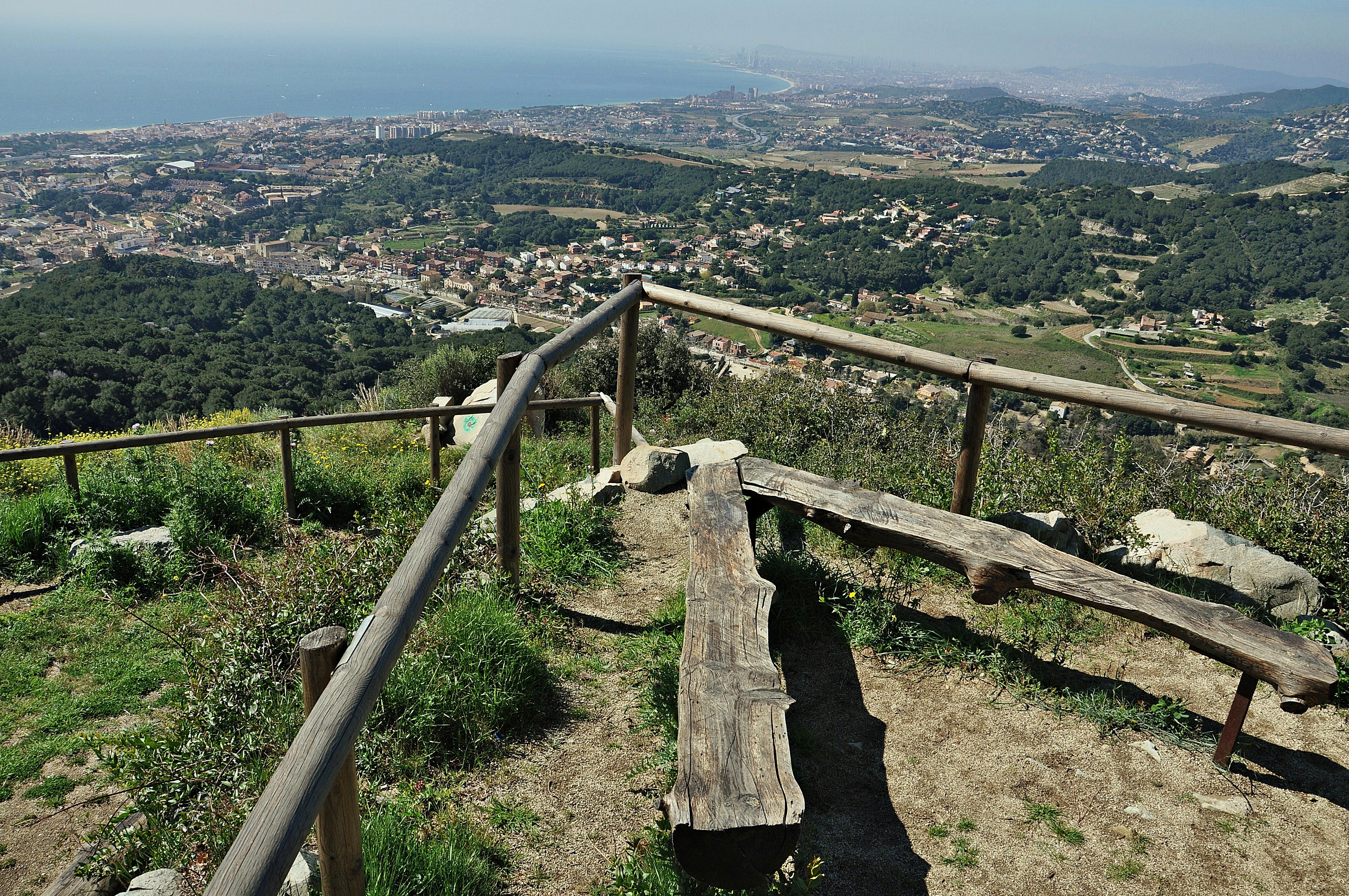 maresme-cataluña